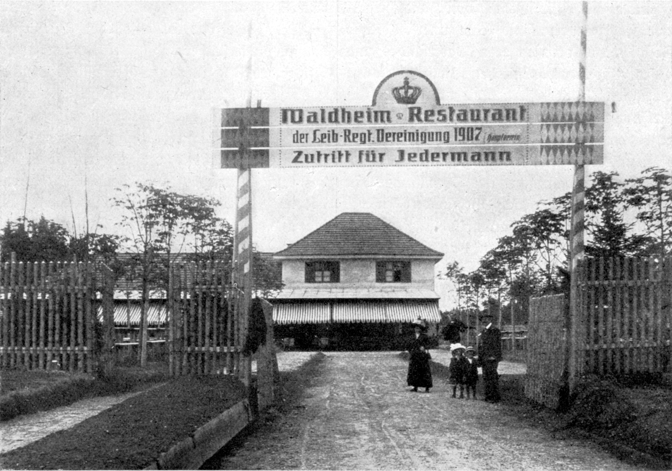 Das Waldheim, später Leiberheim im Jahr seiner Eröffnung 1911